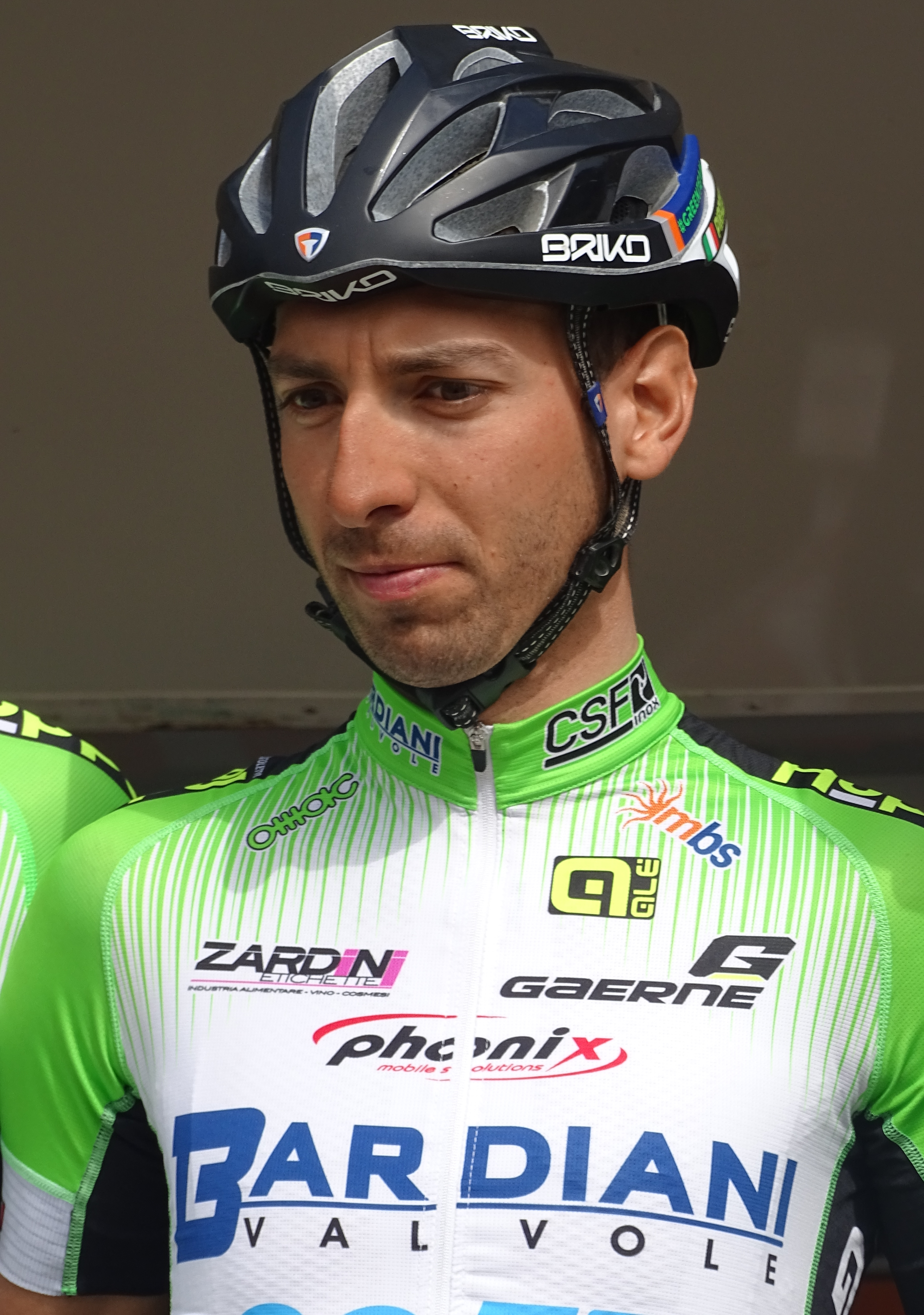 Reportage réalisé le jeudi 16 avril à l'occasion du départ et de l'arrivée du Grand Prix de Denain 2015 à Denain, Nord, Nord-Pas-de-Calais, France.